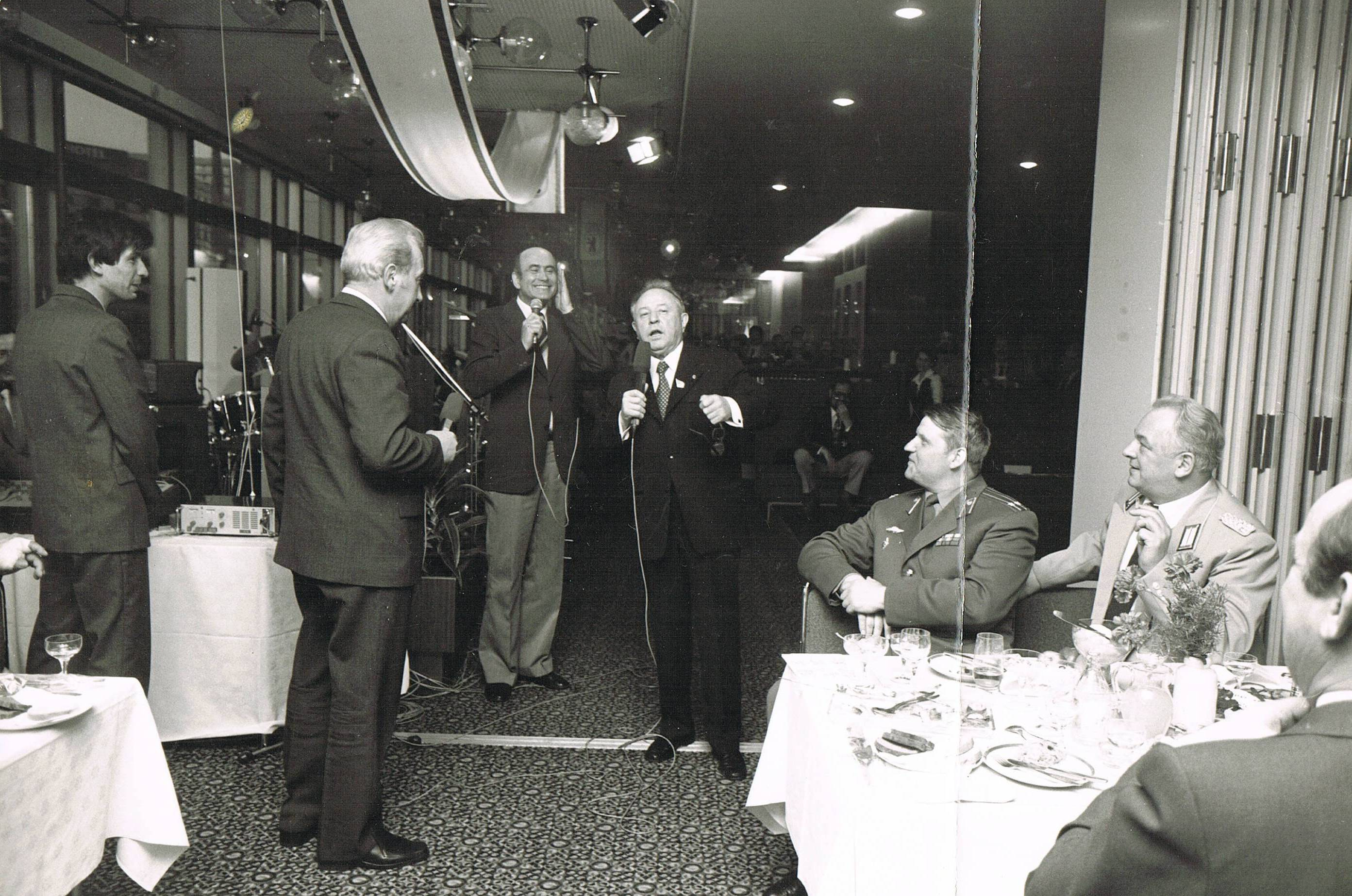 Министр МГБ ГДР Эрих Мильке и 1-й Секретарь Берлинского Окружкома ЦК СЕПГ Конрад Науман на ужине в день окончания Съезда СЕПГ. Берлин.